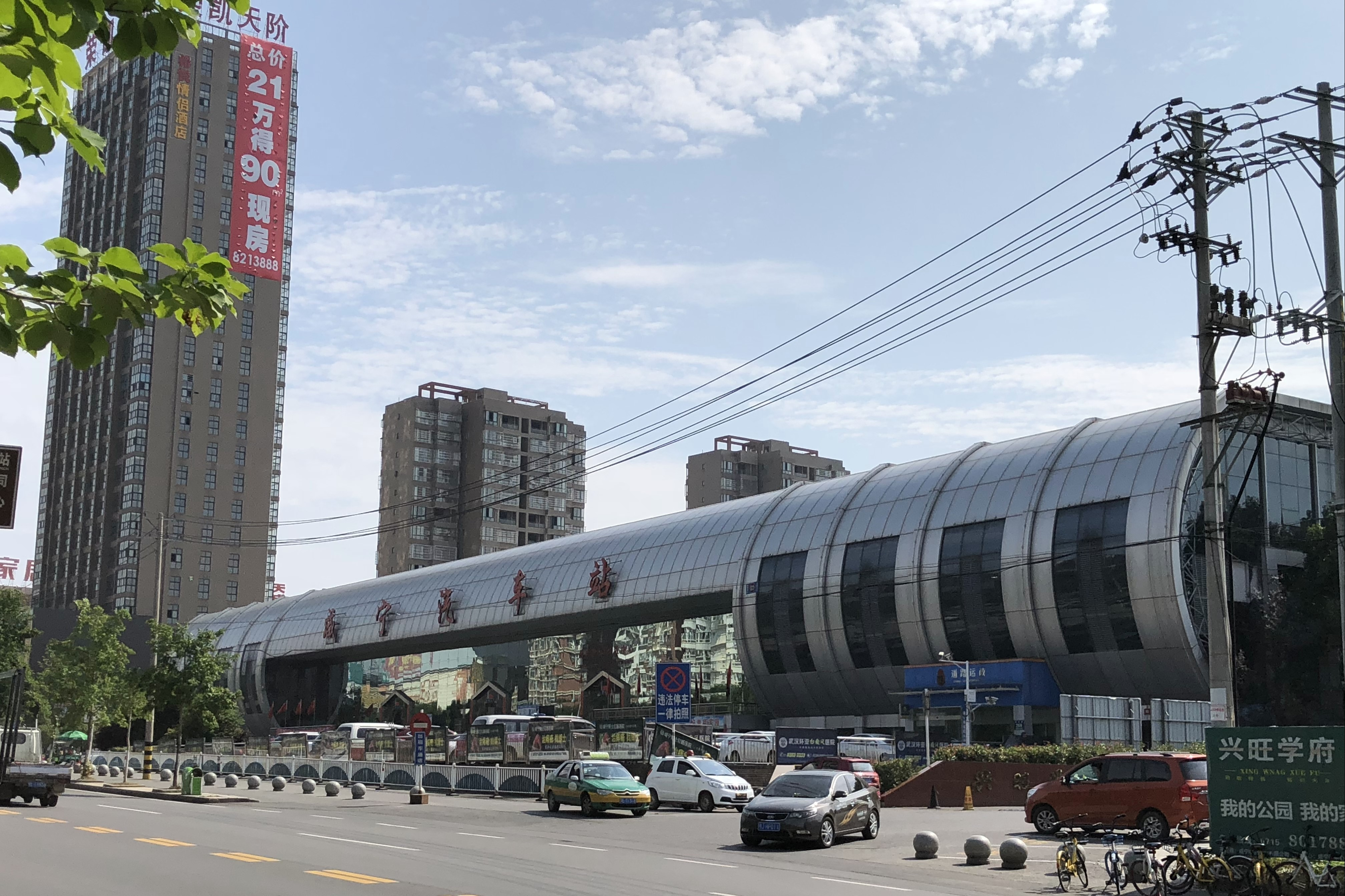 中文（中国大陆）: 咸宁汽车站